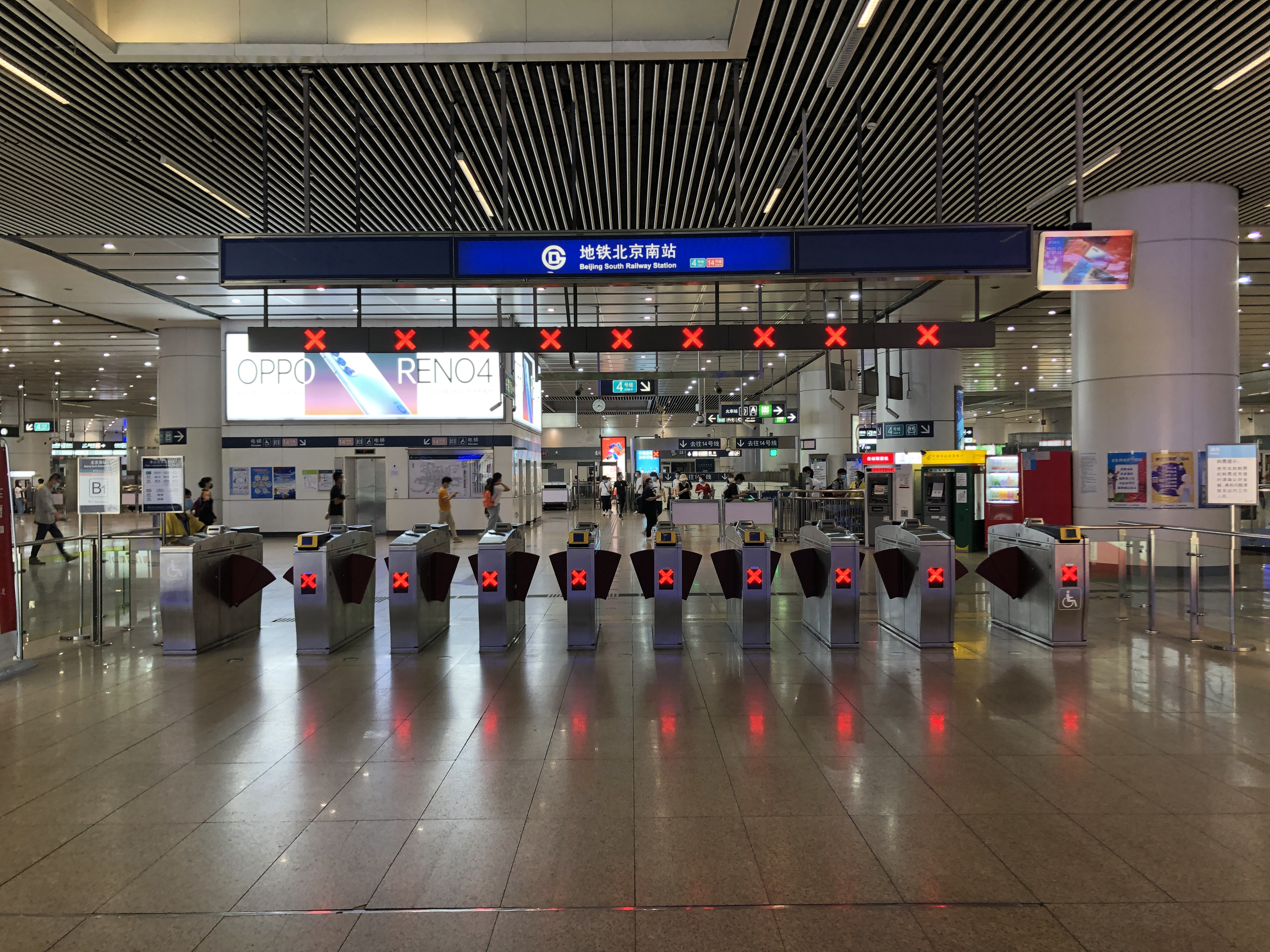 中文（中国大陆）: 北京地铁北京南站B1口